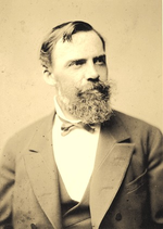 Maximilian Joseph Haushofer (1811 - 1866), Německý malíř.